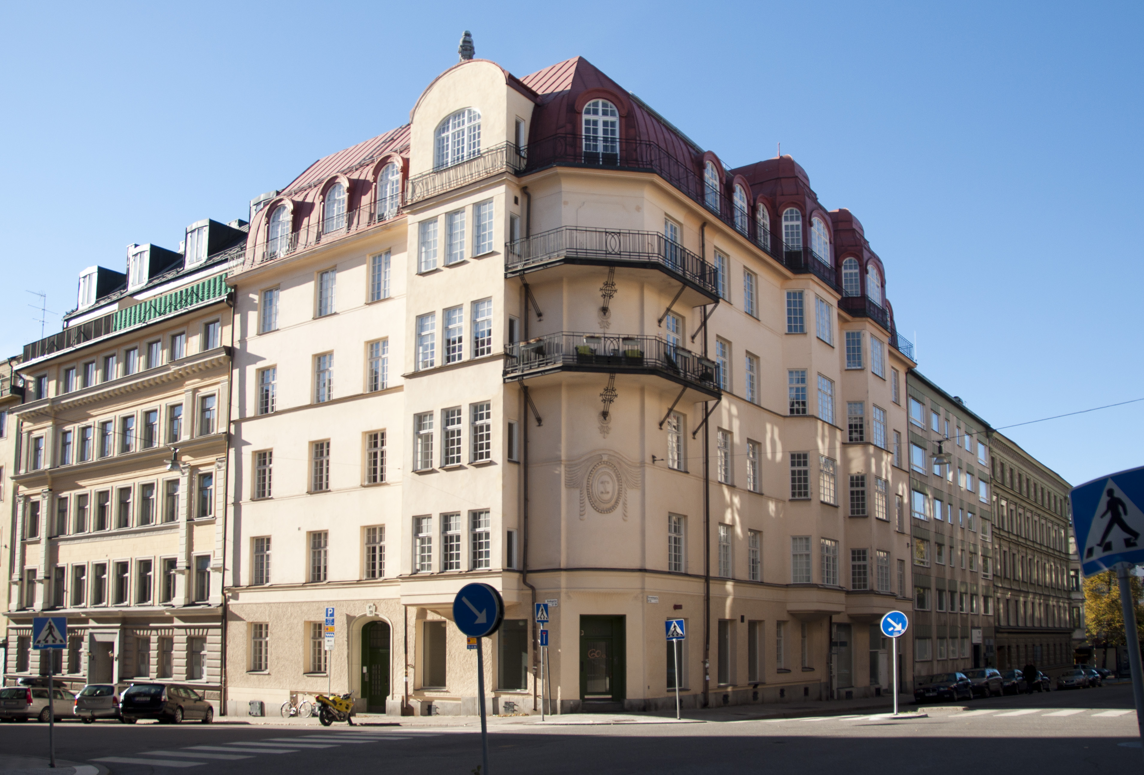 Brahegatan 39, Östermalmsgatan 60. Byggnadsår 1880, arkitekt Anders Gustaf Forsberg. 1907-09 genomgripande ombyggnad arkitekt Hagström & Ekman